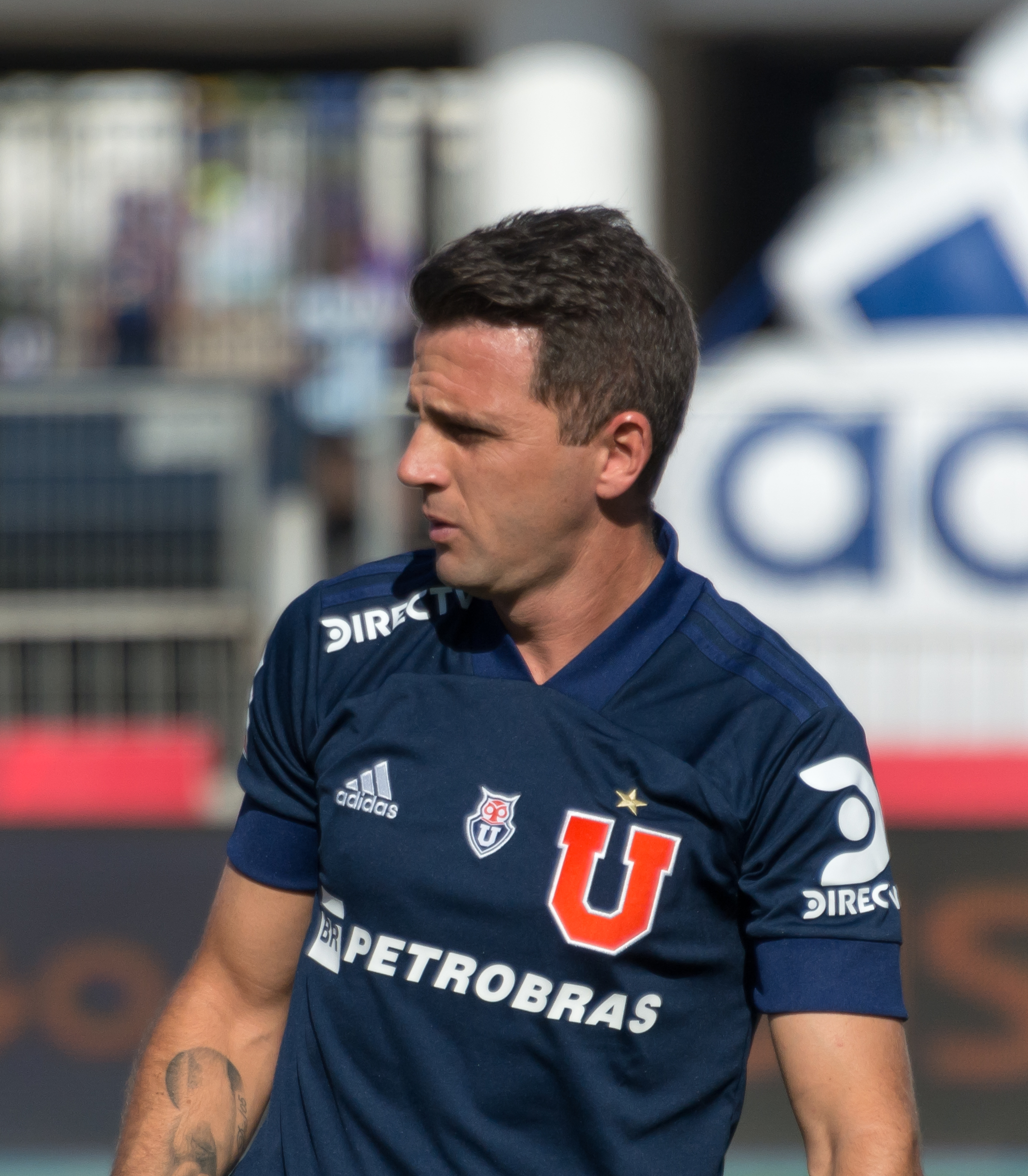 Universidad de Chile v Unión La Calera, Estadio Nacional, Ñuñoa, Santiago, Región Metropolitana, Chile